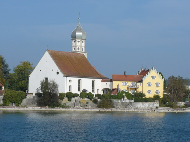 Blick auf Wasserburg (Bodensee), Bayern: Links Pfarrkirche Sankt Georg; Rechts Pfarrgebäude